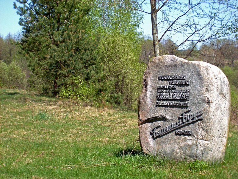 Месца, дзе раней знаходзіўся фальварак Крынкі